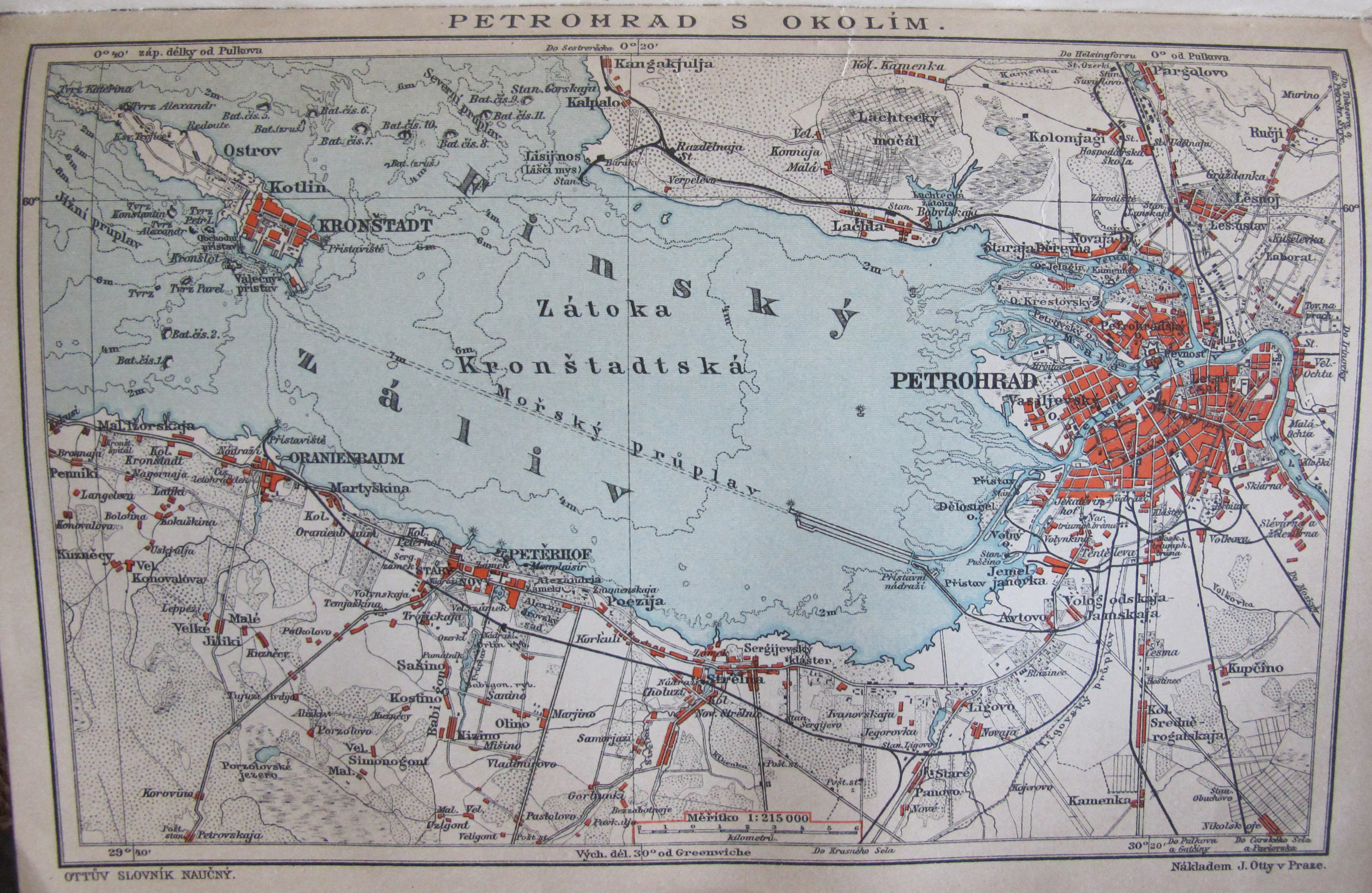 Původní popisek: PETROHRAD S OKOLÍM.